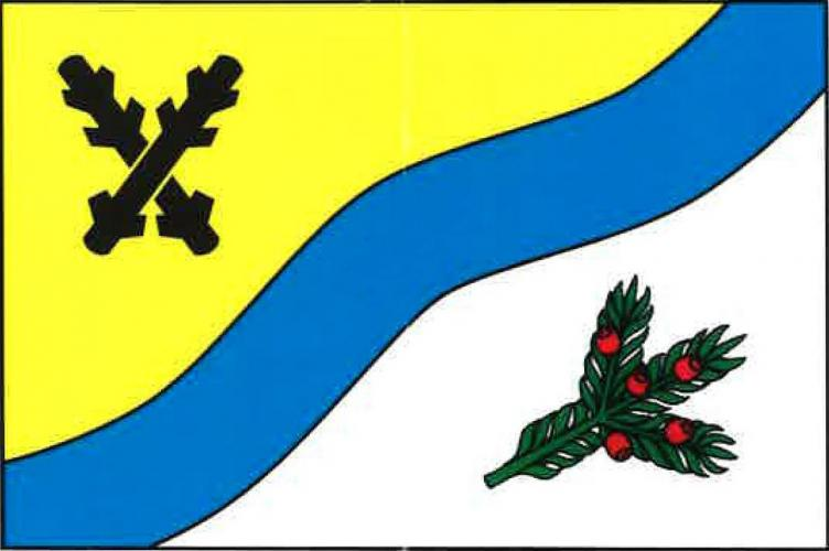 vlajka, Krompach, okres Česká Lípa